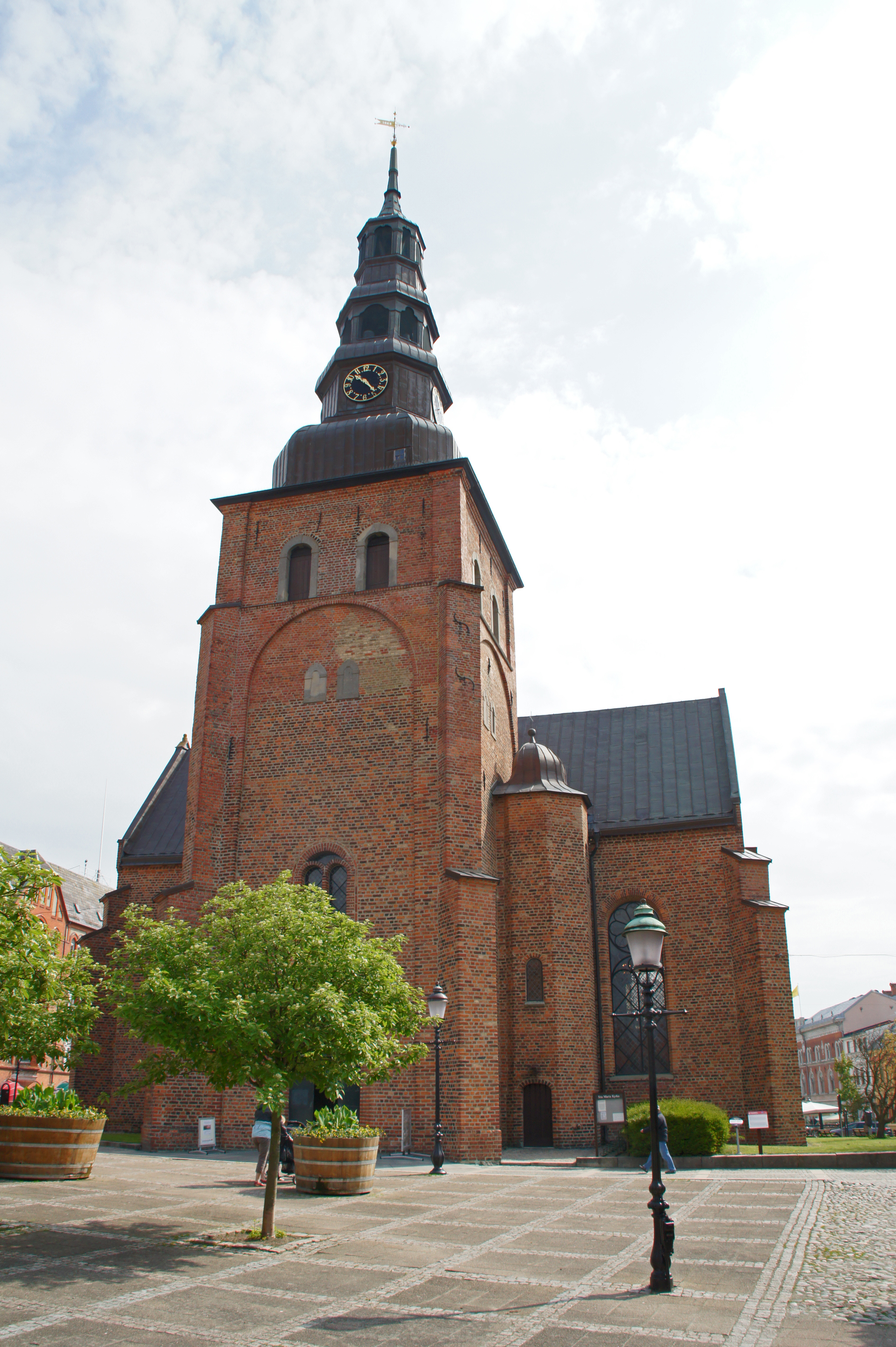 2010-05-22 06-05 Schweden 0550 Ystad, St. Maria Kyrka.jpg